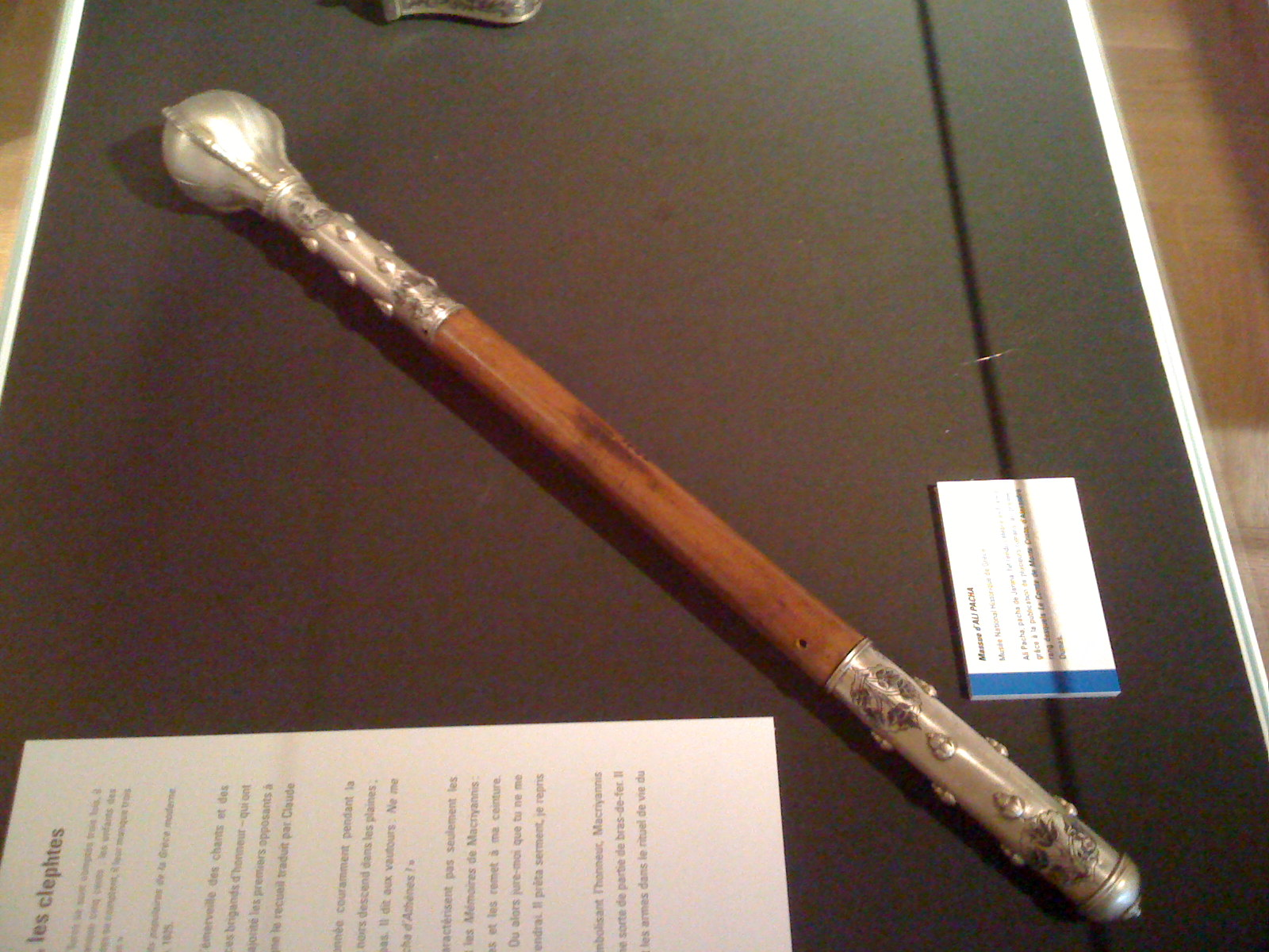 Massue d'Ali Pacha de Janina (1741?-1822) Pièce du Musée national historique de Grèce exposée à l'Institut et musée Voltaire de Genève (Suisse)